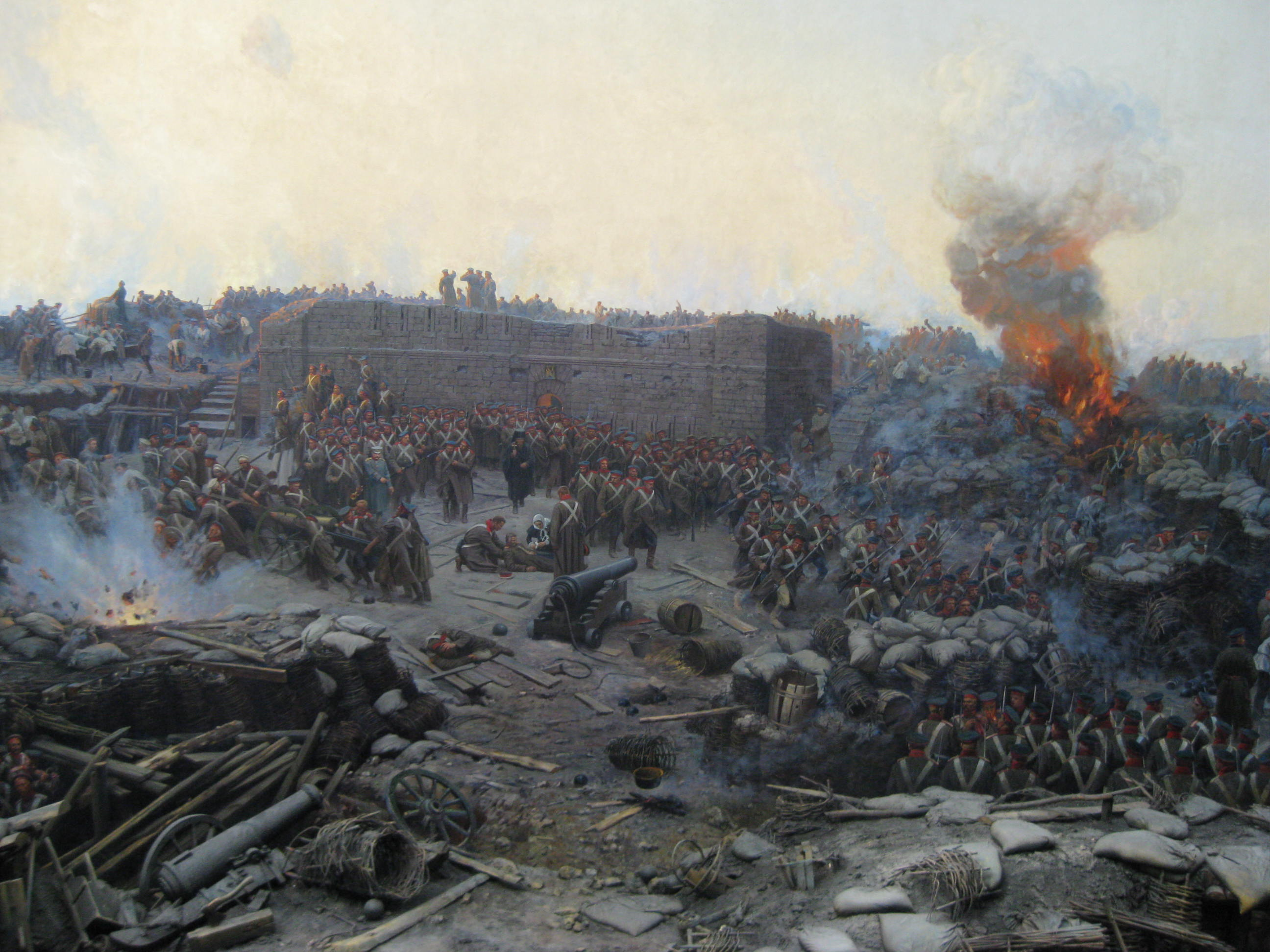 Onderdeel van het panoramaschilderij van het beleg van Sebastopol in 1854 door Franz Roubaud